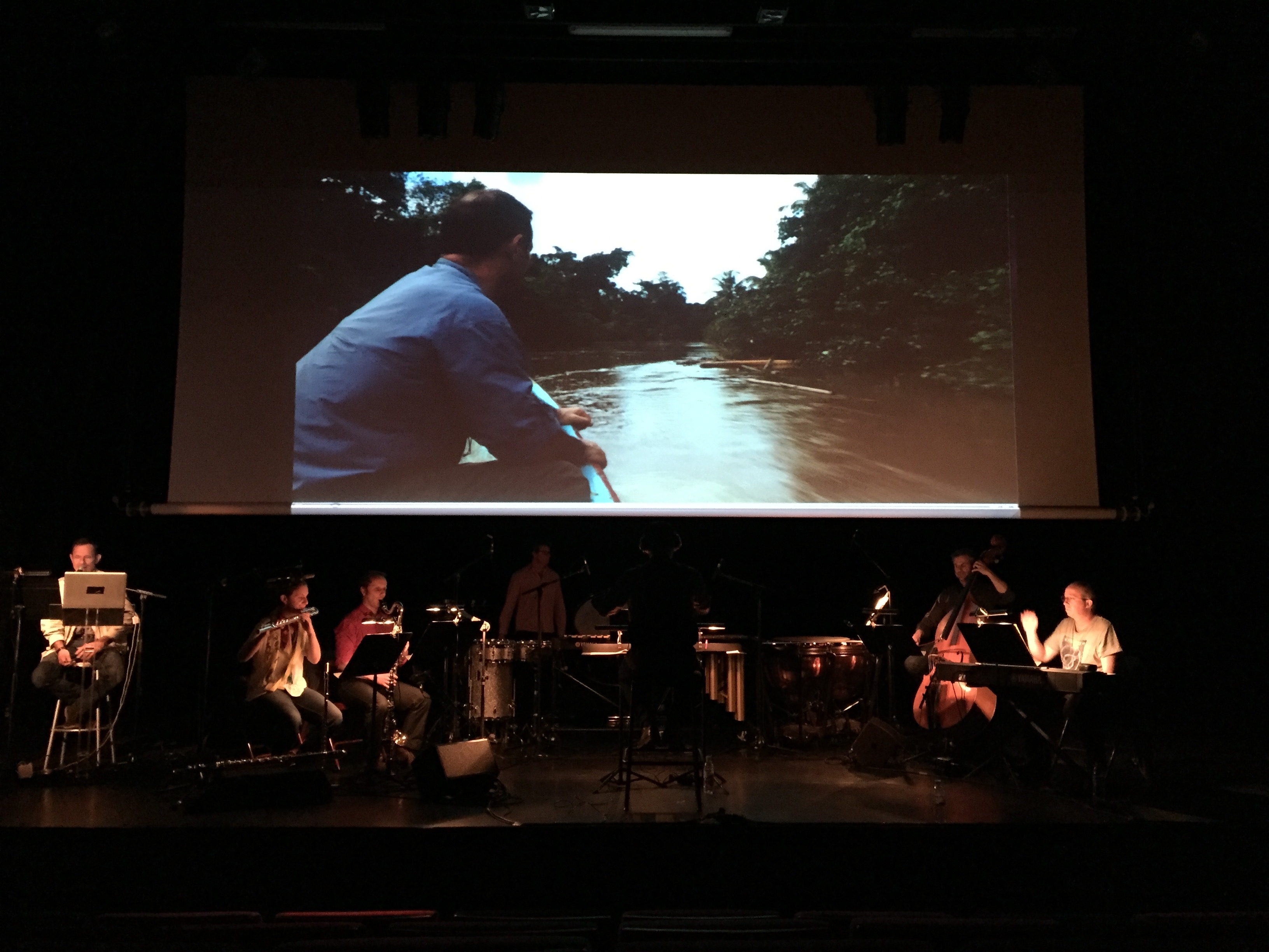 Ciné-concert "Raïba et ses frères" Compositeur Hervé Postic. Direction d'orchestre Fabrice Kastel.